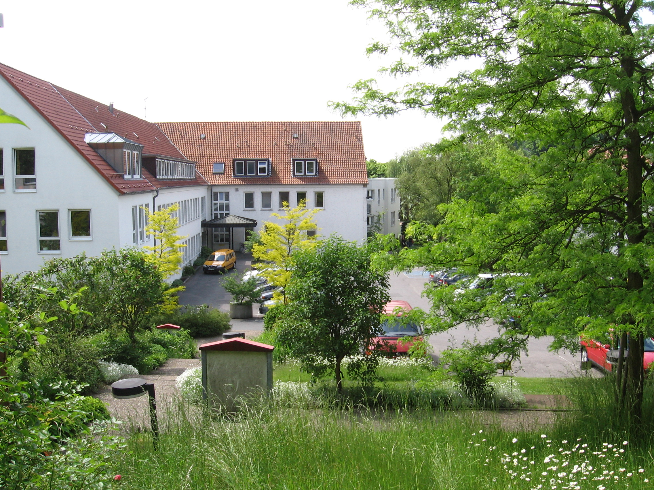 Eingangsbereich des Kinderhospital Osnabrück in Nahne, Osnabrück, Niedersachsen, Deutschland